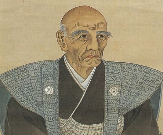 村田清風の肖像。